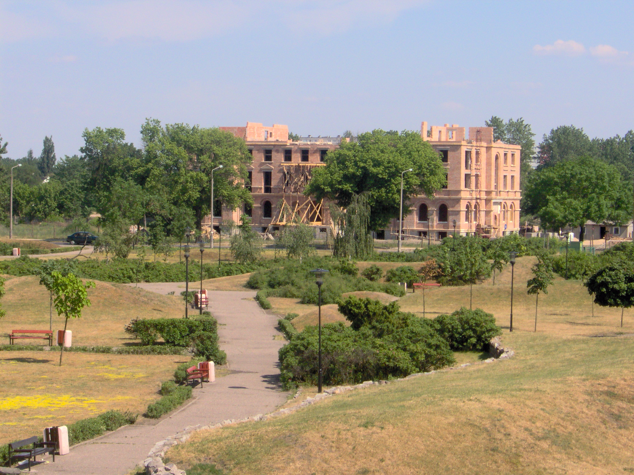 Budowa Pałacu Bursztynowego (2007 r.)